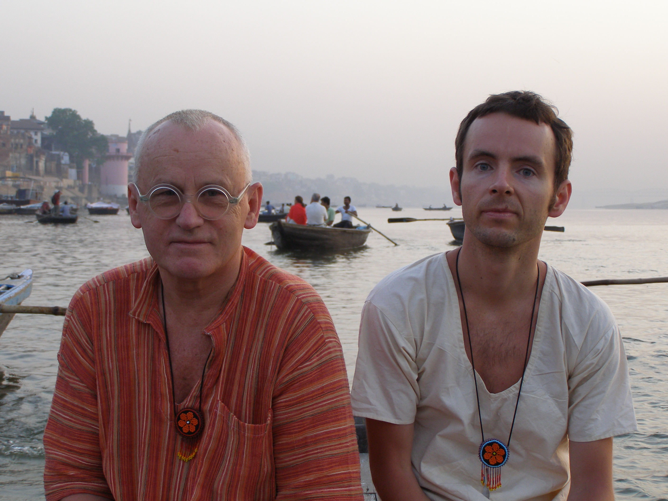 Vilen Künnapu koos poja August Künnapuga Indias.